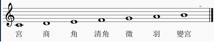 七聲調式中的清樂音階